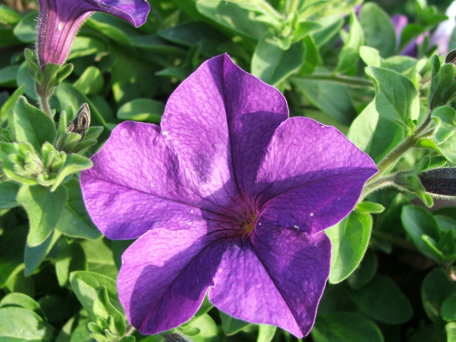 Petunia x hybrida